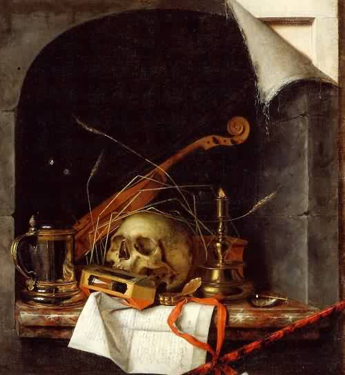 Vanitas